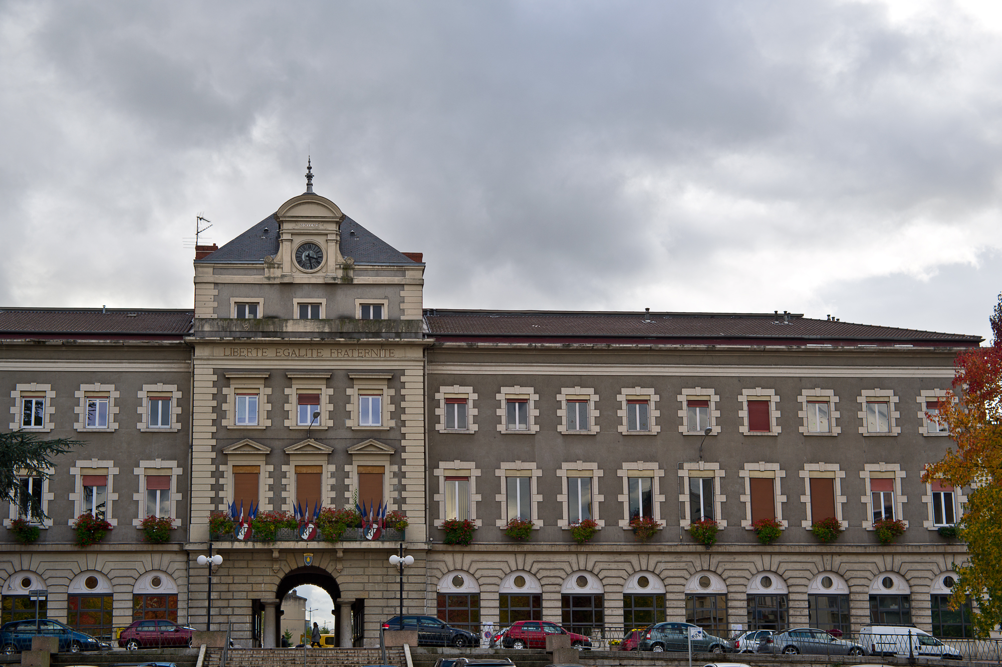 Canal de Givors, (Inscrit, 1995) .